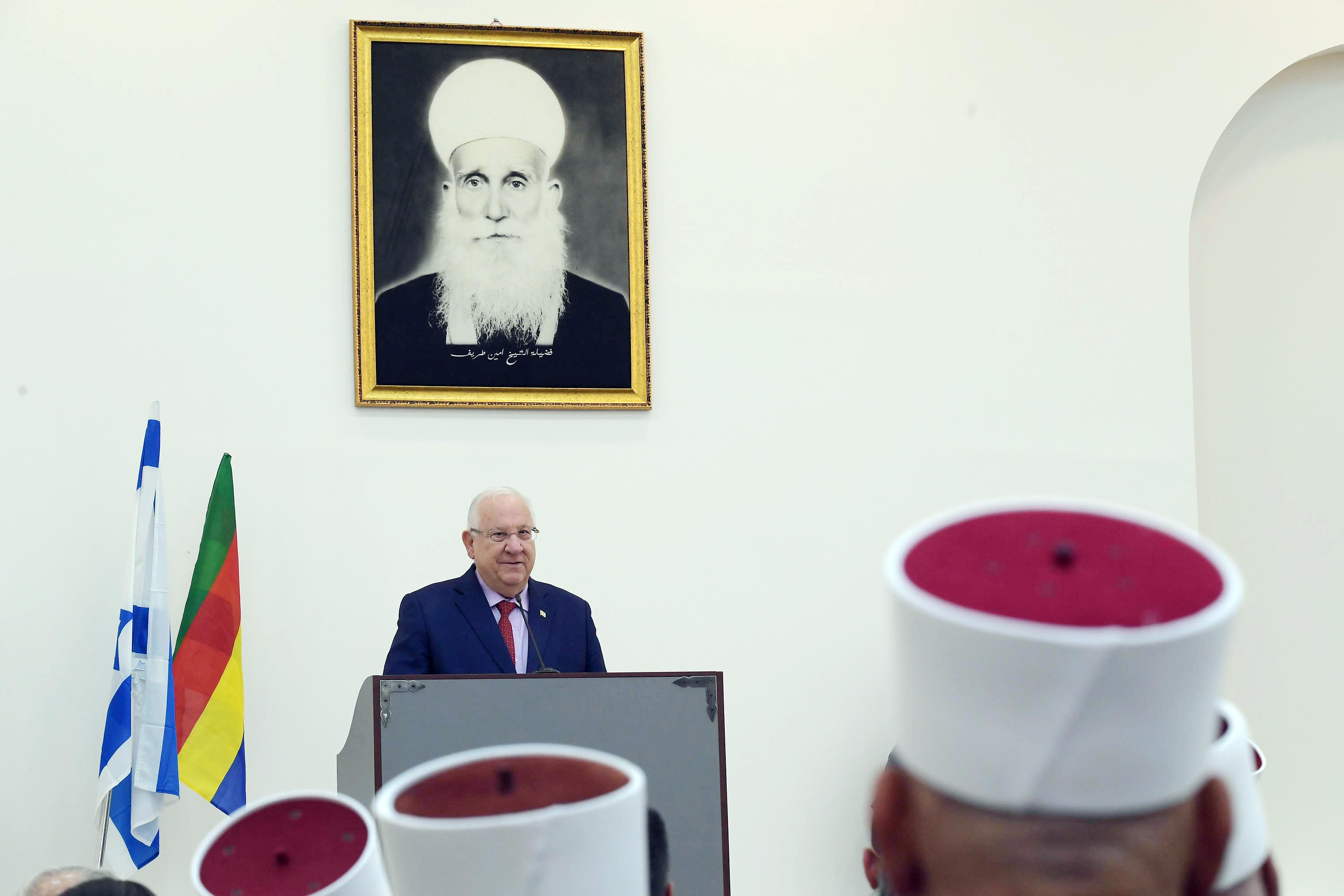 ראובן ריבלין נשיא מדינת יראל בביקור בכפר הדרוזי ג'וליס לרגל חגה של העדה הדרוזית נבי שועייב